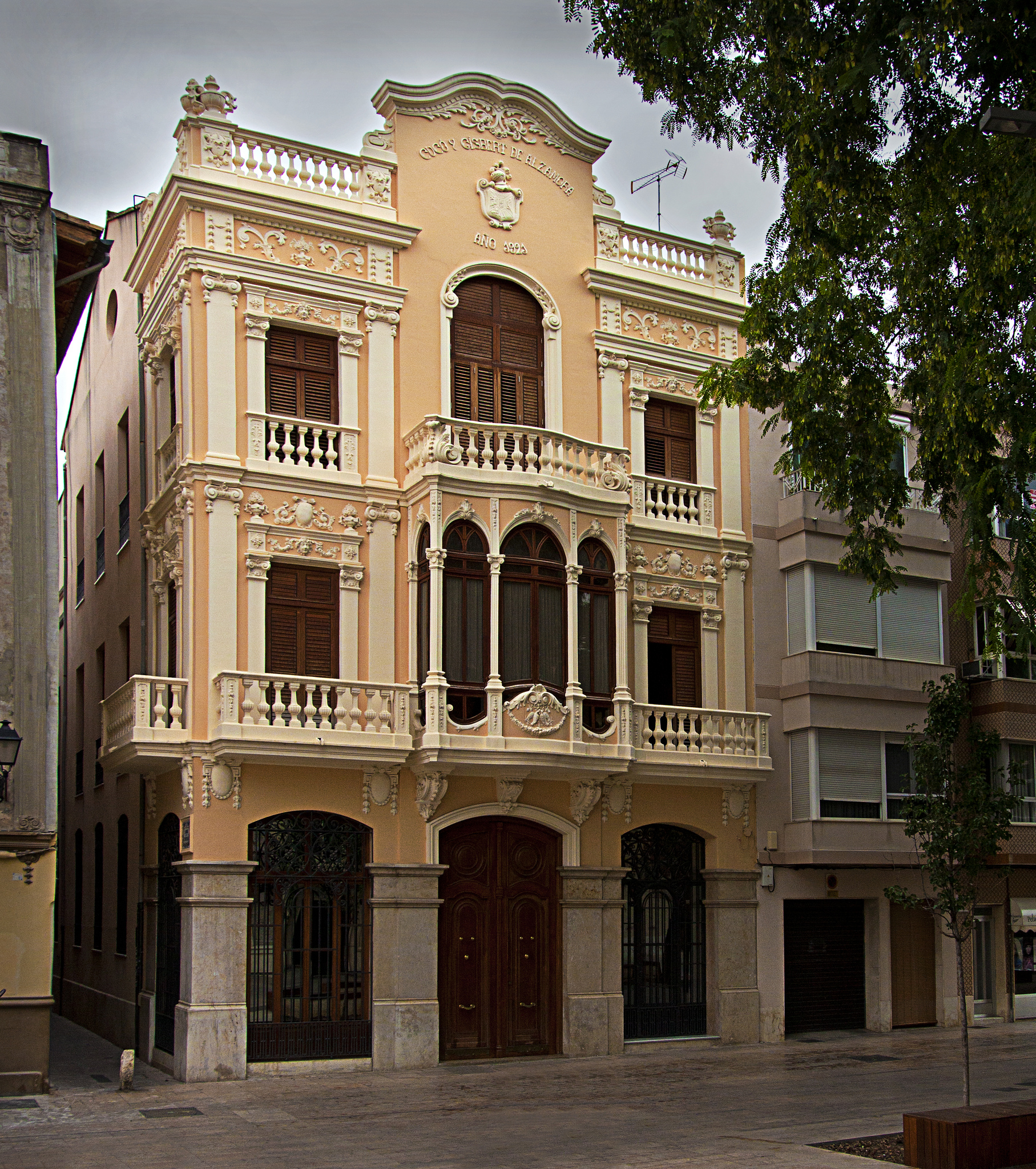 Casa Cucó. Alzira.